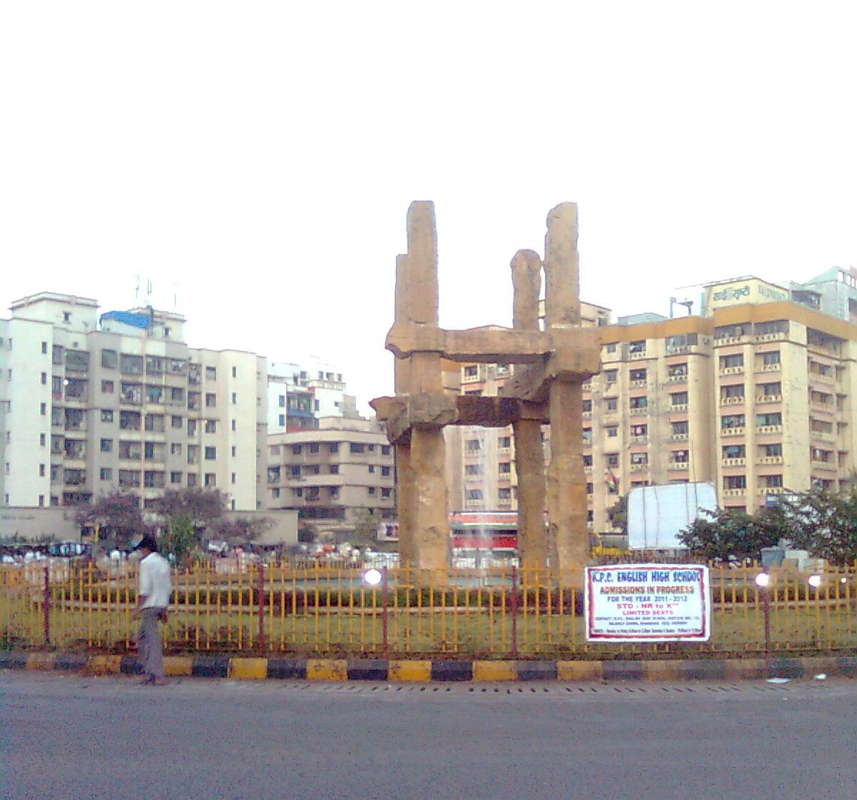 खारघर